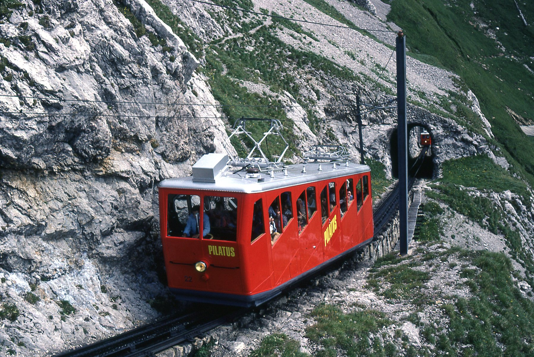 Photo: Trams aux Fils. Prise en septembre 1981 La ligne du Pilate a été construite en 1889 à voie étroite et crémaillère type (Locher), sa longueur et de 4,6 Kilomètres, ce chemin de fer est le plus raide du monde. Autres photos